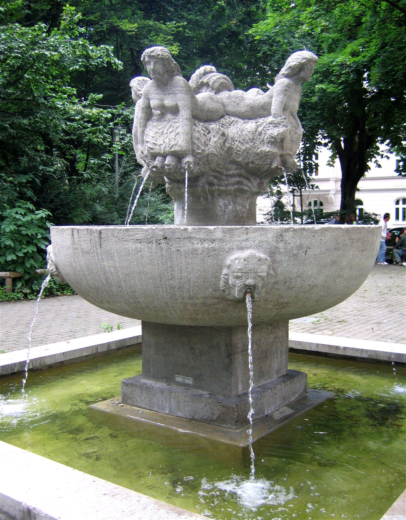 Brunnen mit vier Nymphen, Elmar Dietz, 1934, Golierplatz, München